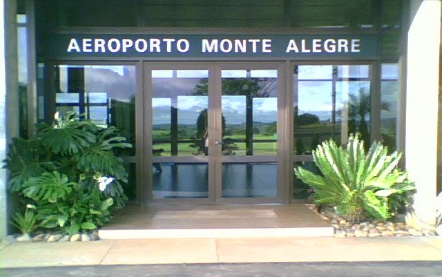 Aeroporto Monte Alegre (aeroporto de Telêmaco Borba), em Telêmaco Borba, no Paraná.